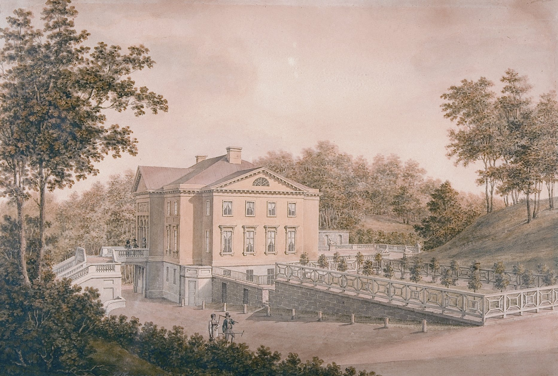 Akvarell på Gunnebo och hur det såg ut på familjen Halls tid, troligen utförd runt år 1800 med tanke på kläderna.